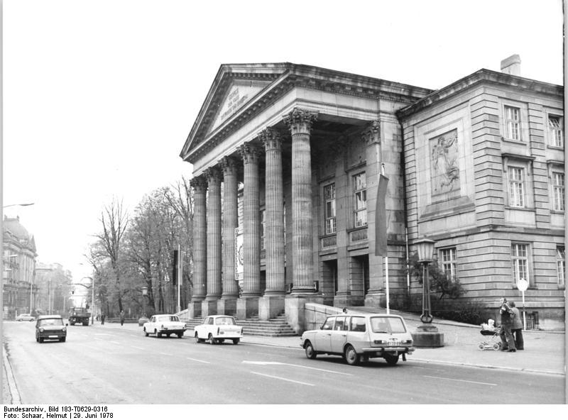 Meiningen, Theater ADN-ZB Schaar 29.6.1978 Zü-Schm. Bez. Suhl: Das Theater in Meiningen.